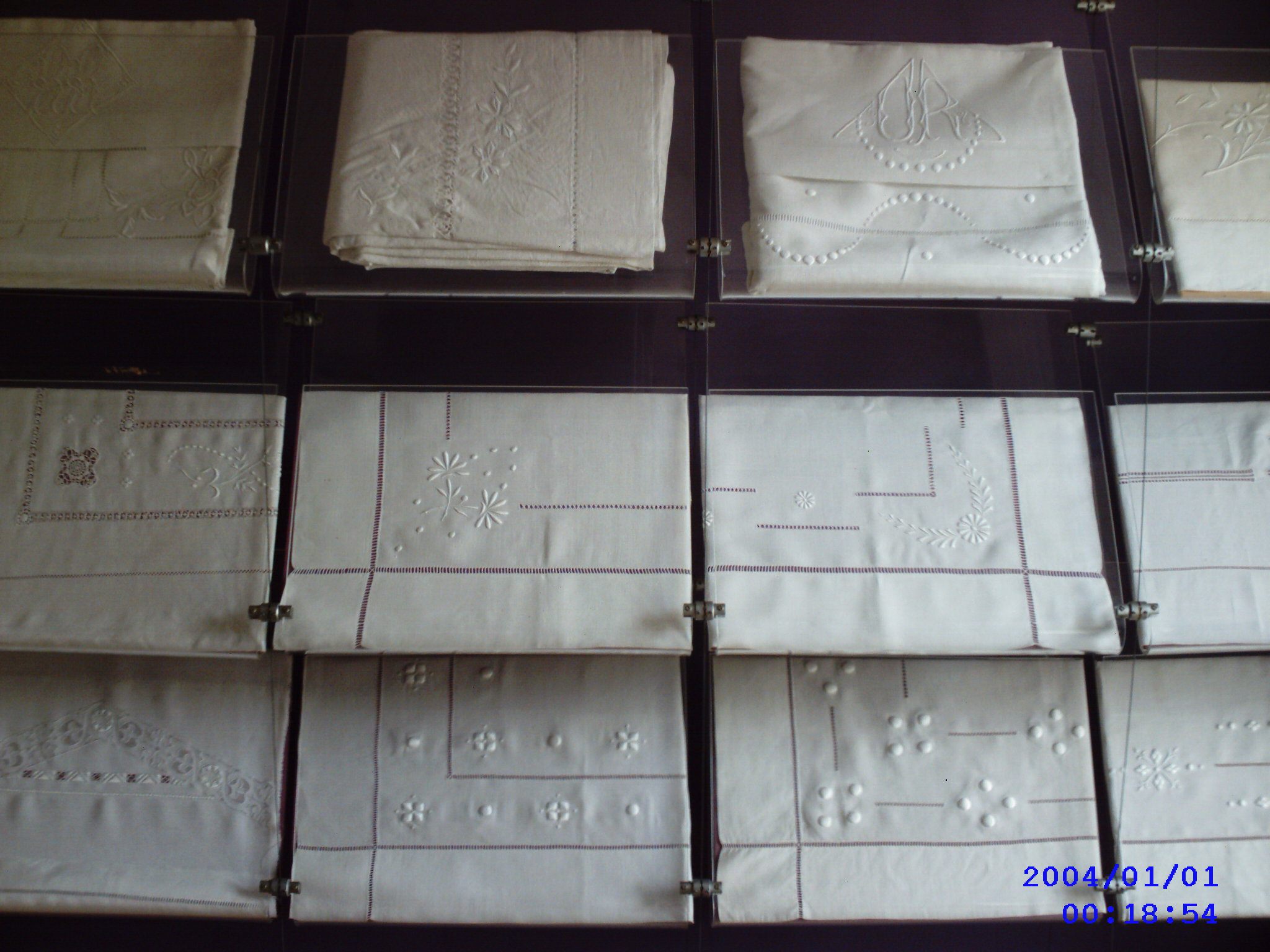 Draps brodés.